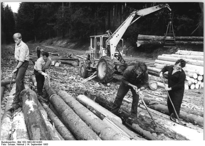 Holzhalde, Entrinden ADN-ZB Schaar 14.9.1983 Bez. Suhl: Rund 1 100 Forstarbeiter aus neun Bezirken der DDR helfen, den Thüringer Wald von Bruchholz zu befreien. Neben der Aufbereitung und Abfuhr des Holzes messen die Forstleute der Bekämpfung des Borkenkäfers große Aufmerksamkeit zu. Dazu werden die Stämme entrindet. - siehe auch 1983-0914-4N